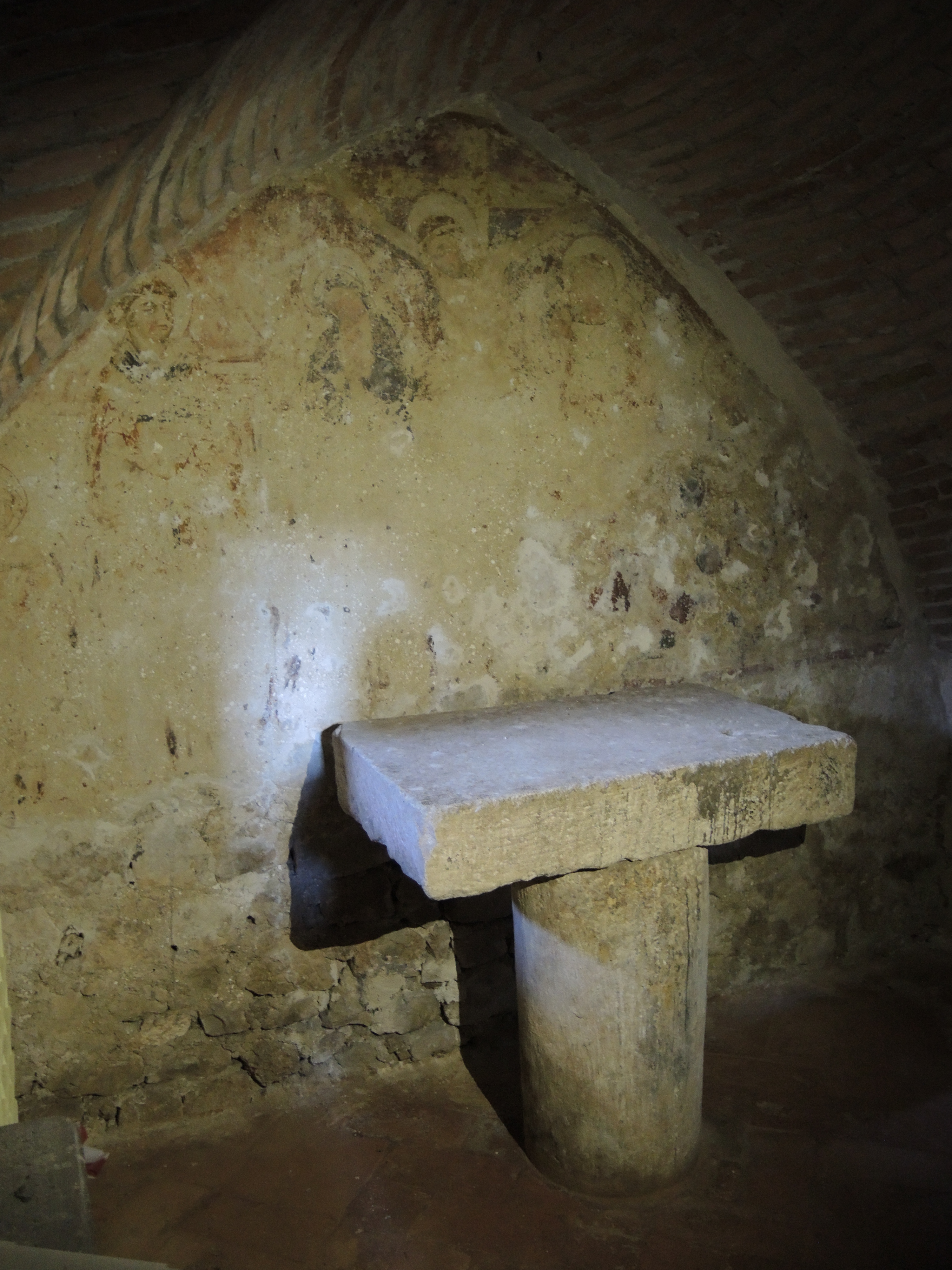 Fossa (L'Aquila): Chiesa di Santa Maria ad Cryptas